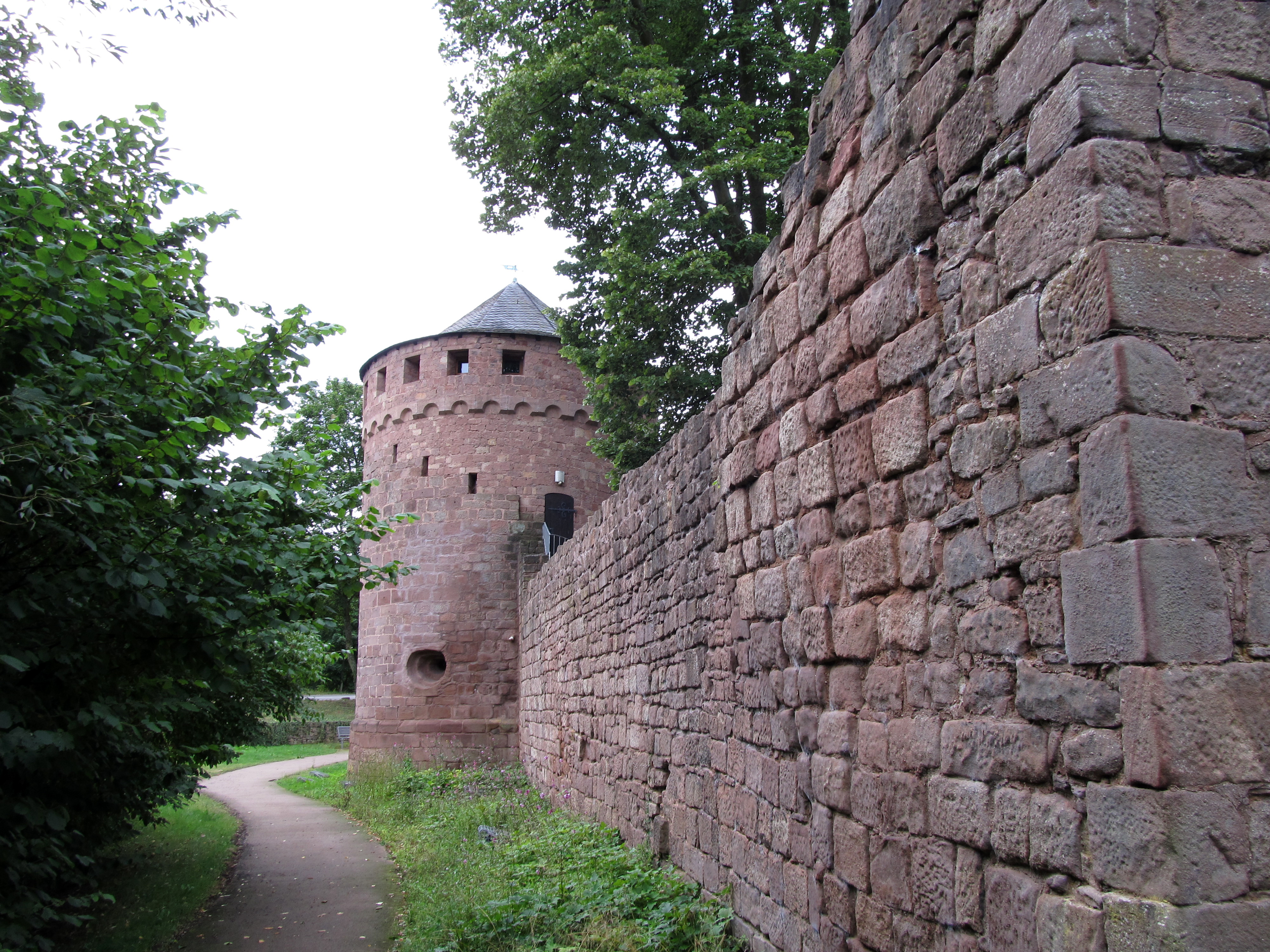 Ruine der Burg Kerpen in Illingen, Saarland